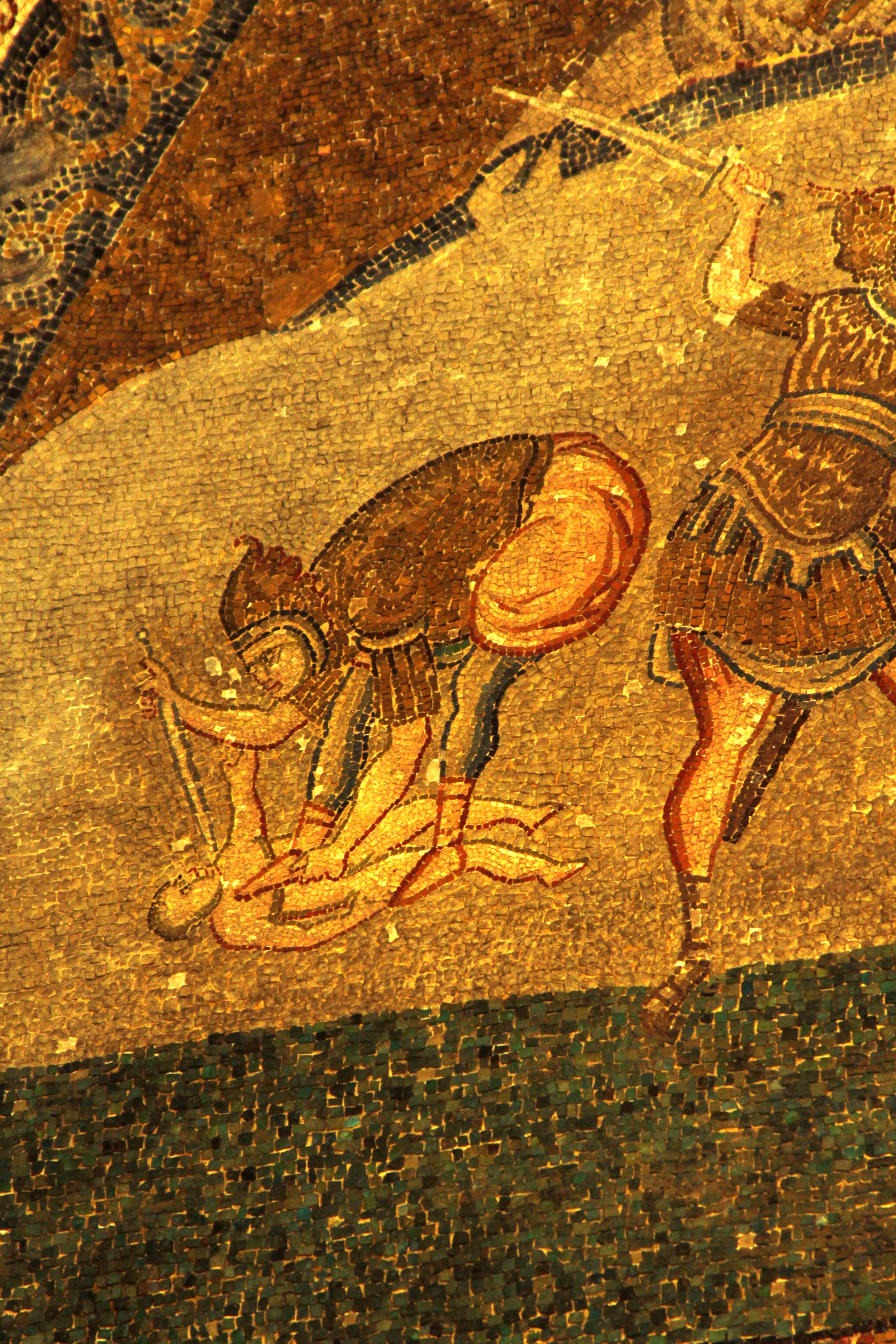 Detalhe do Massacre dos Inocentes.